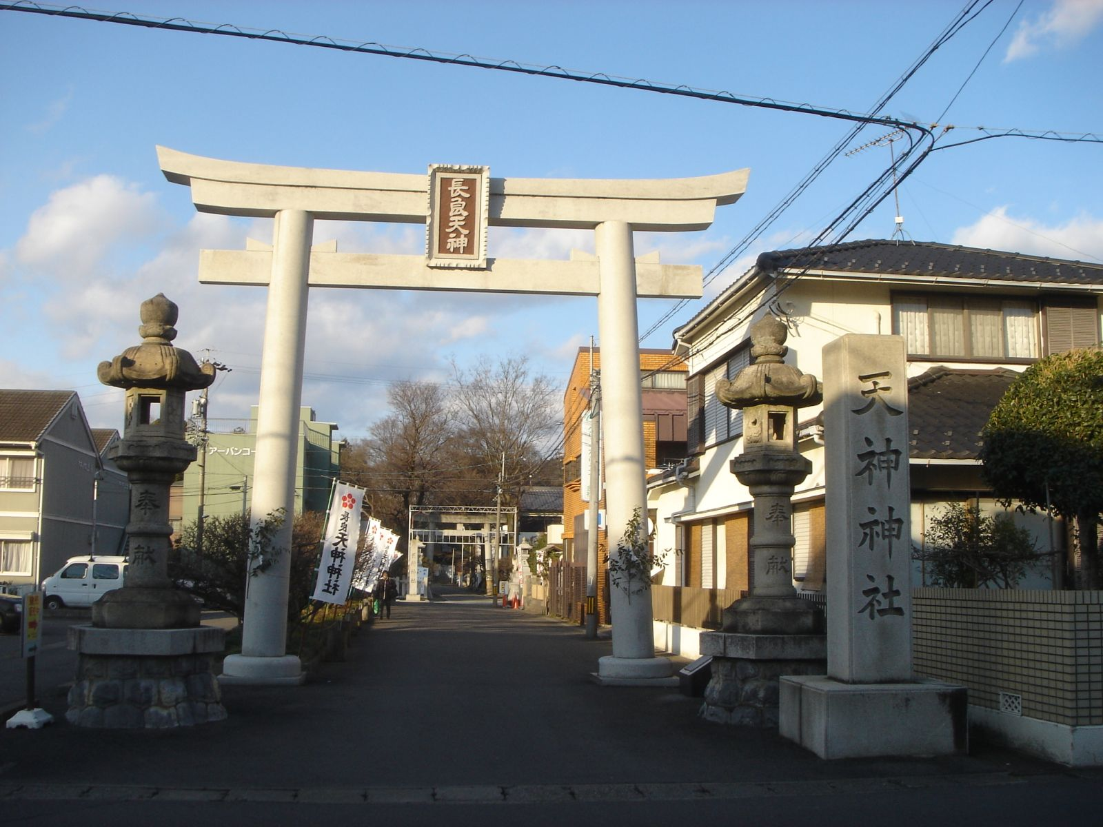 Nagara tenjin jinja(Shrine)(長良天神神社),Gifu,Gifu,Japan(岐阜県岐阜市)で撮影。